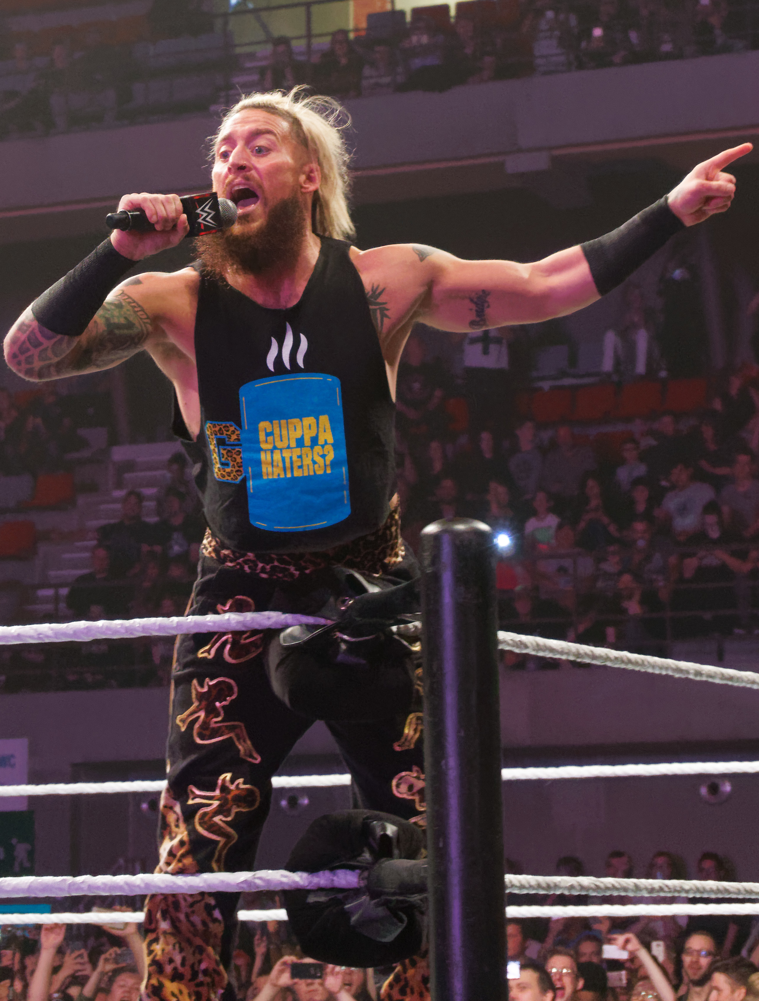 Jeff Hardy (c) & Matt Hardy (c) defeat Big Cass & Enzo Amore, Cesaro & Sheamus (in Triple Threat Match) Info on the match : WWE RAW Tag Team Title ( Le vendredi 12 mai, la WWE Live Tour fera escale au Country Hall a Liege pour le spectacle de catch de l'annee! Au programme: des duels impitoyables et des rencontres captivantes entre les meilleures equipes et les plus grands rivaux. )